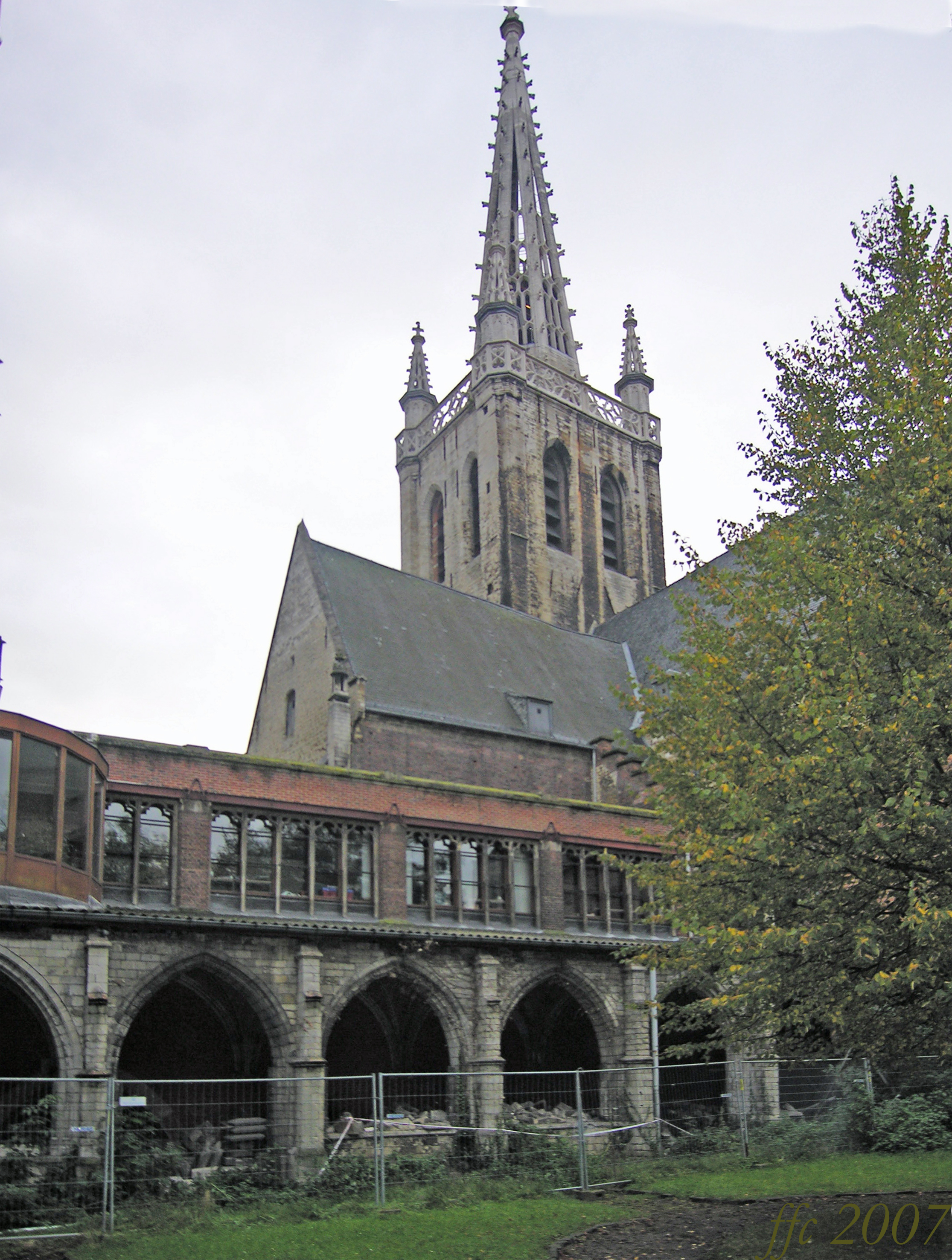 Abdij Sint Geertrui (Leuven) - abadia Santa Gertrudis Lovaina - Sint-Geertrui Abbey in Louvain